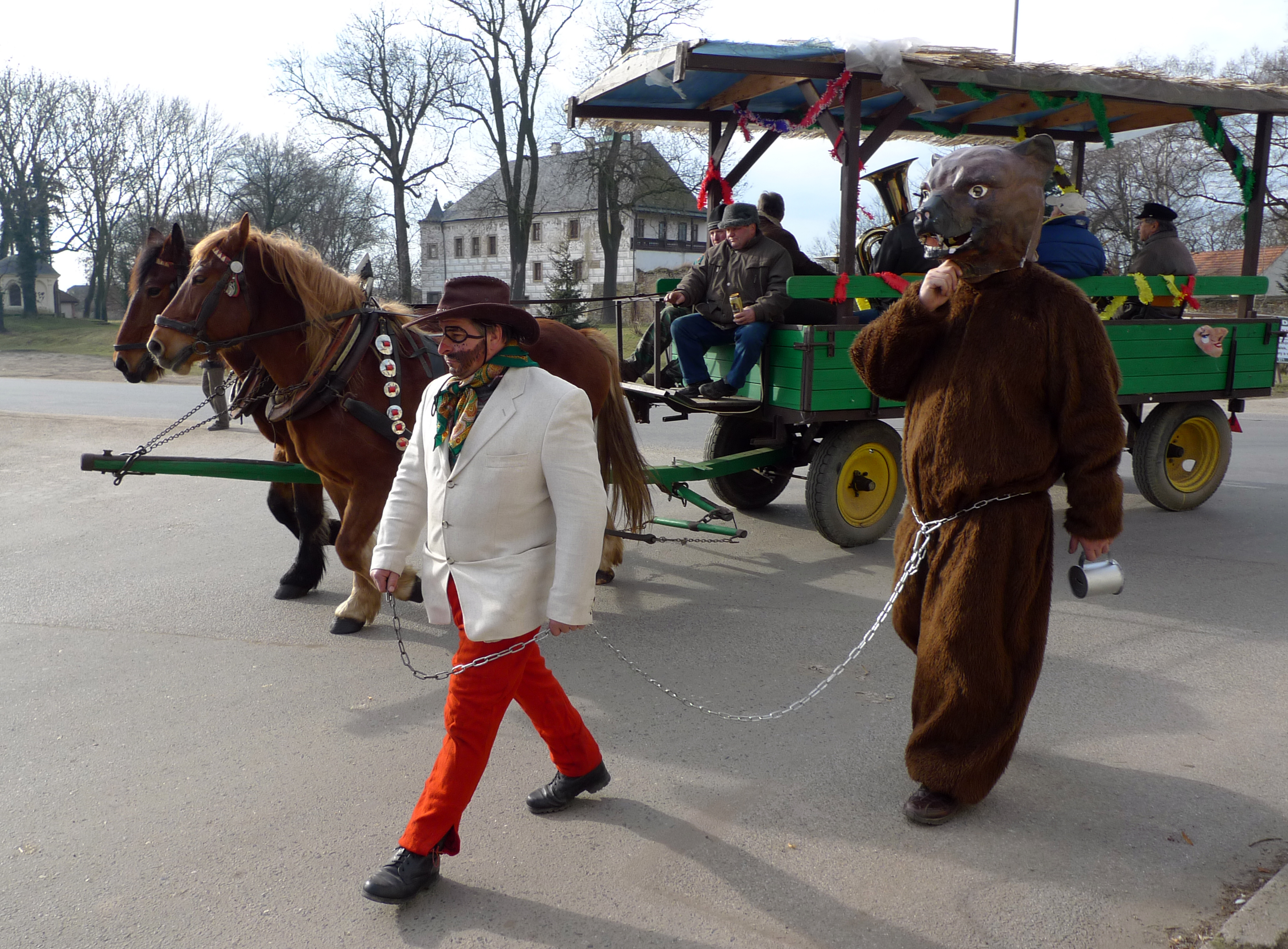 Masopust v Přerově nad Labem v roce 2014.